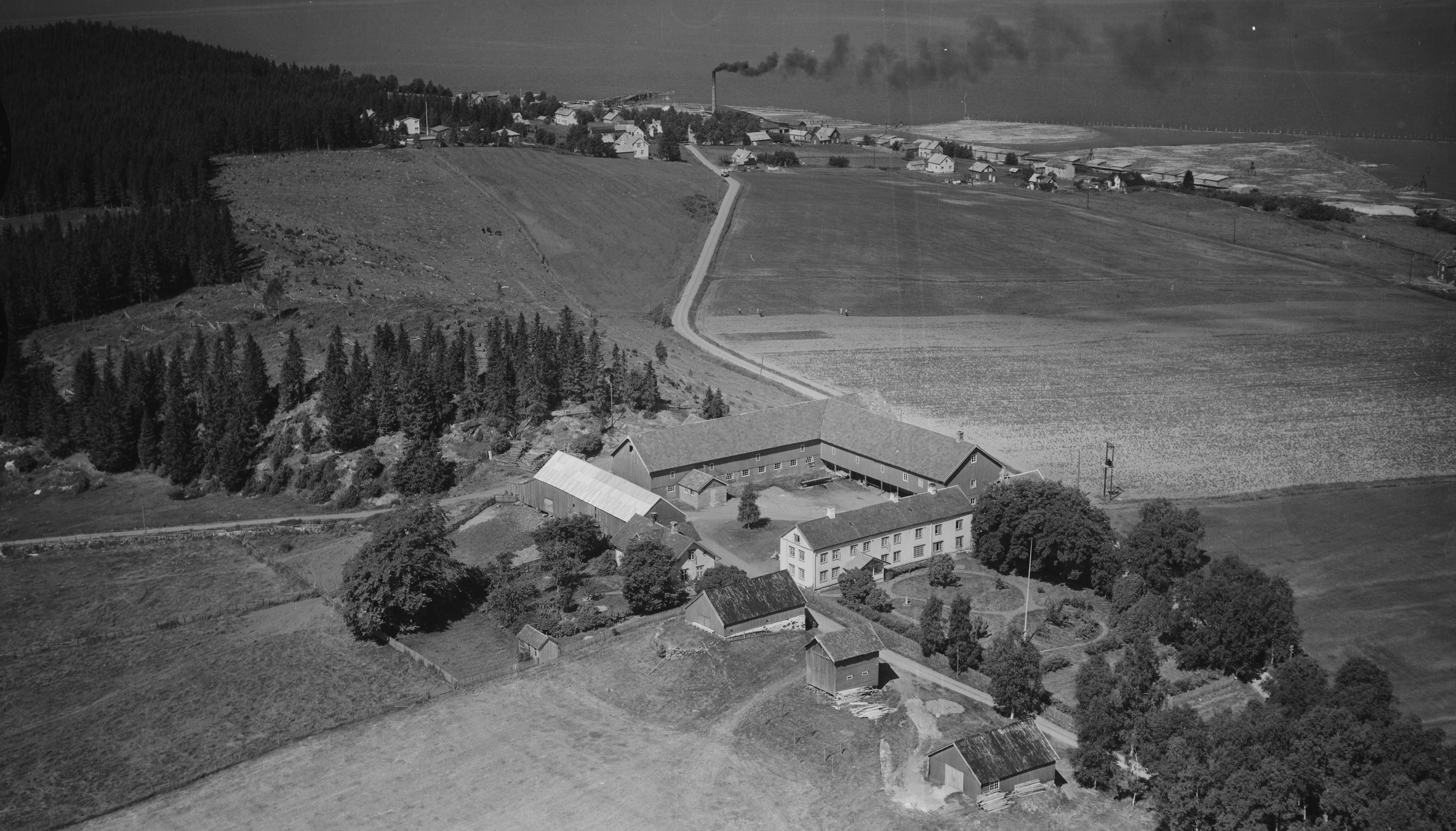 Trones gård i Verdal kommune i Nord-Trøndelag fylke. Trones bruk i bakgrunnen.